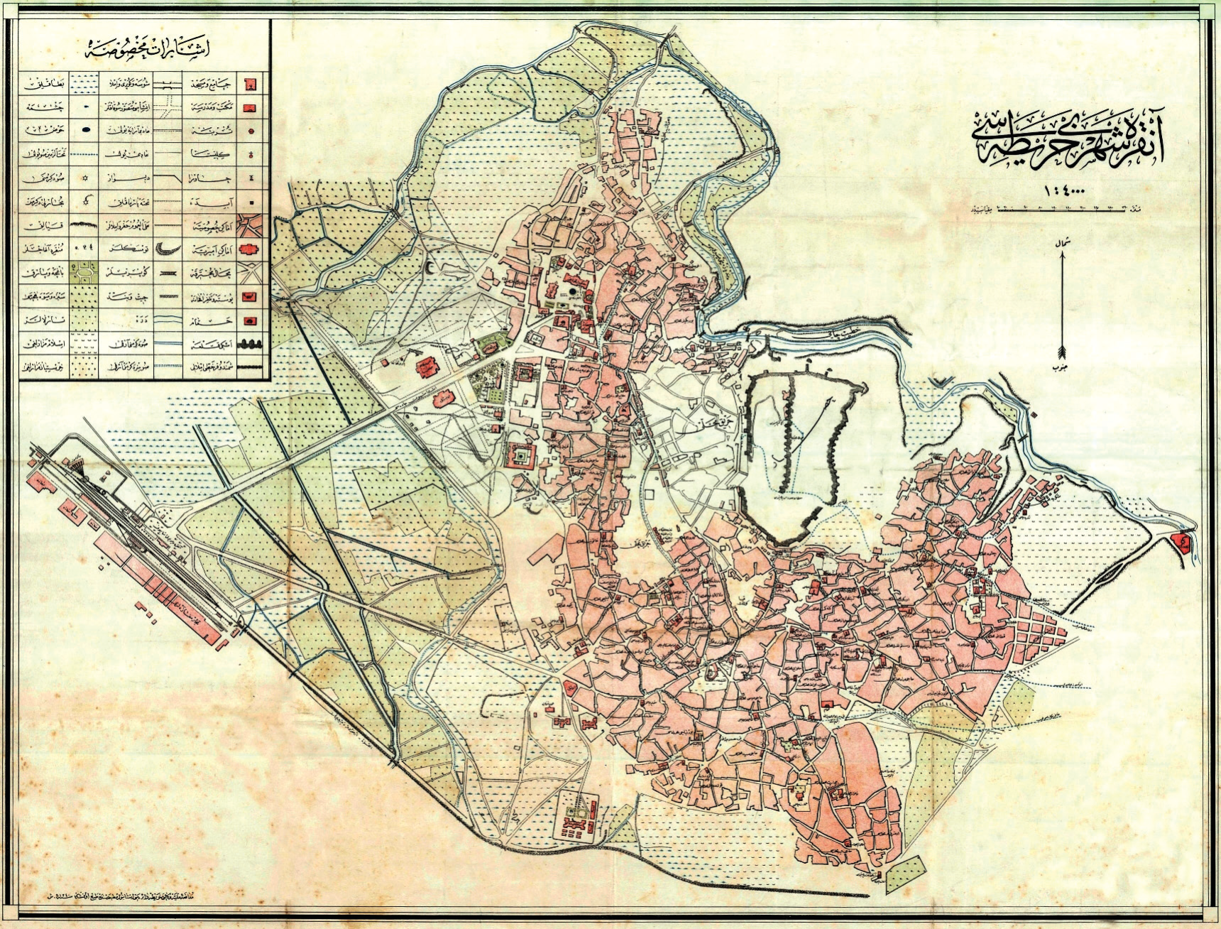 1924 yılında hazırlanan Ankara şehir haritası.